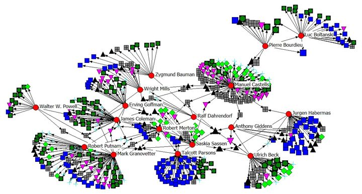 analisis de redes sociales